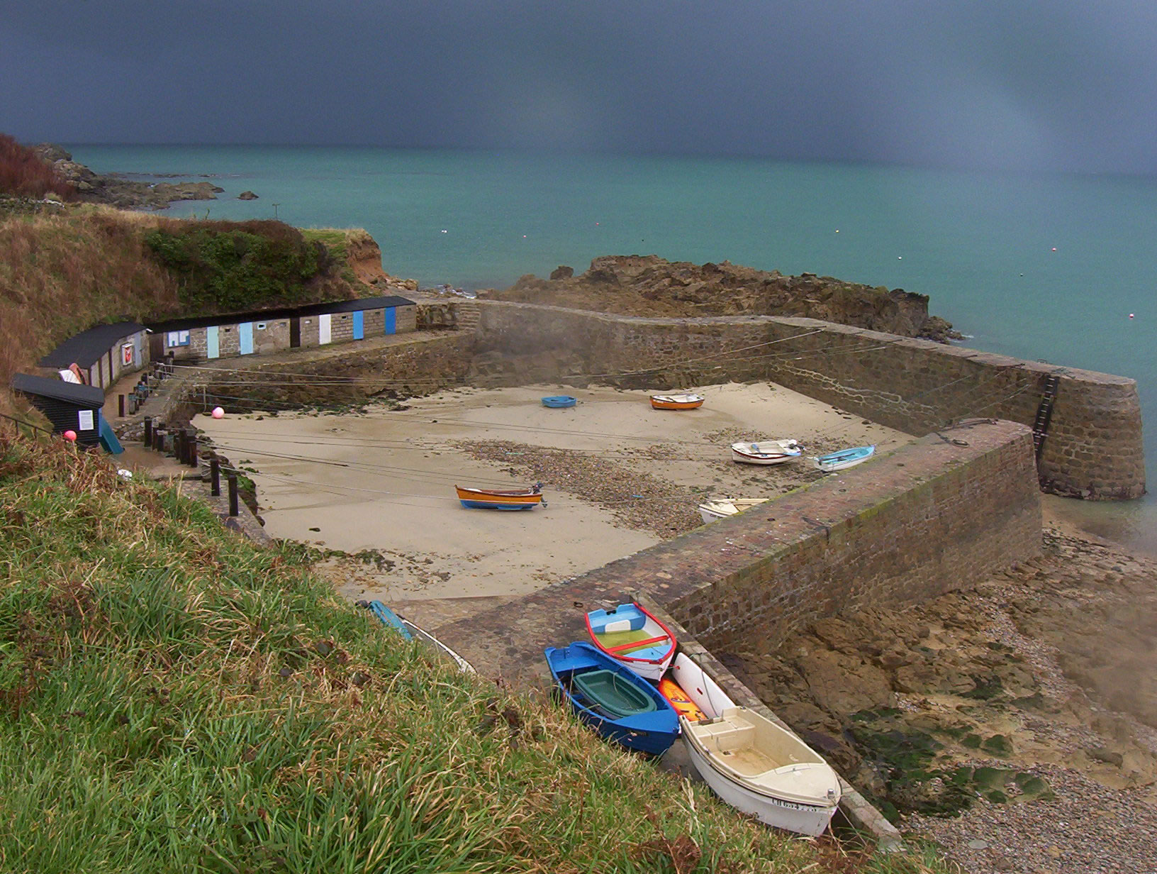 Le Port Racine (marée basse), plus petit port de france, à Saint-Germain-des-Vaux au Cap de la Hague (Normandie). Author : Utilisateur:HaguardDuNord Date : février 2006